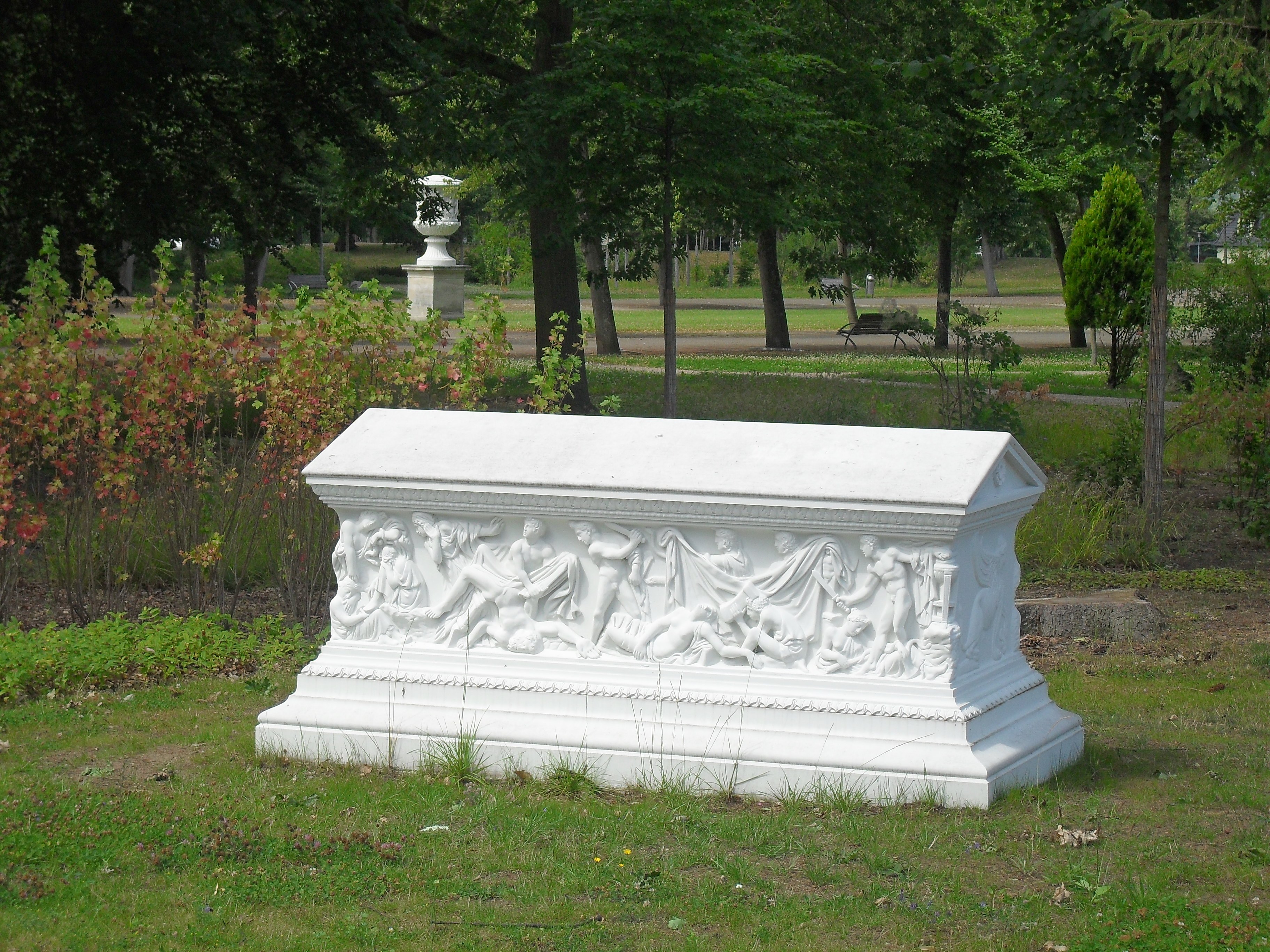 aus der Sammlung der Vatikanischen Museen erworbene Abgüsse des Orestes - Sarkophags im Neustrelitzer Schlosspark